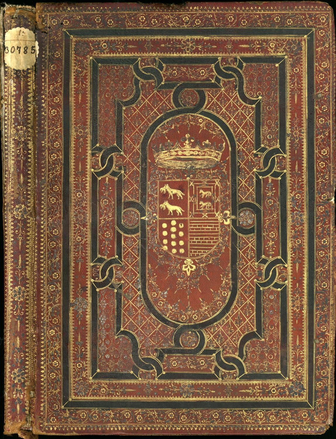 Encuadernación napolitana con las armas del Conde de Castrillo en el tiempo de su Virreinato en Nápoles